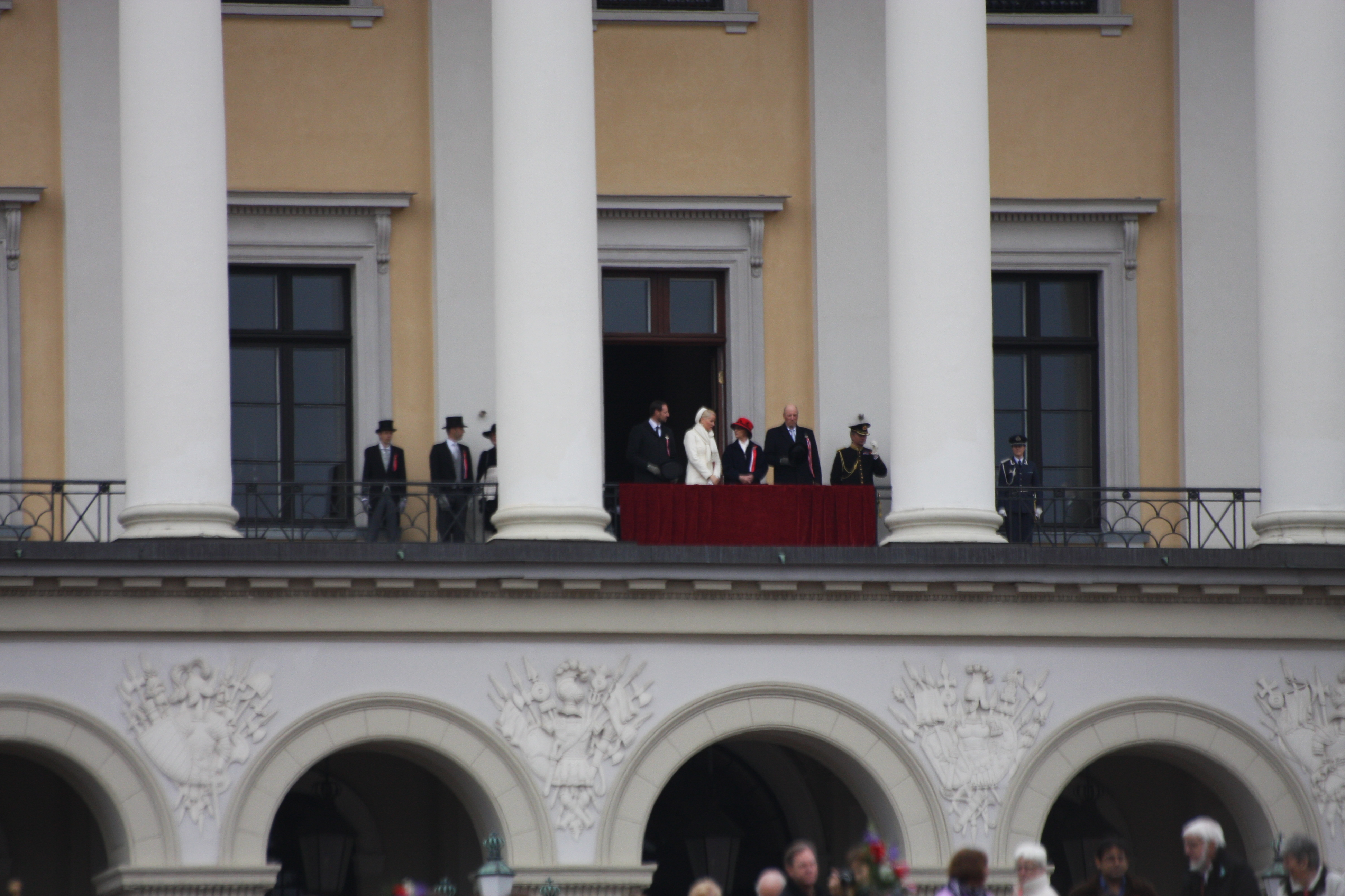 Det kongelige Slott på syttende mai. Oslo.